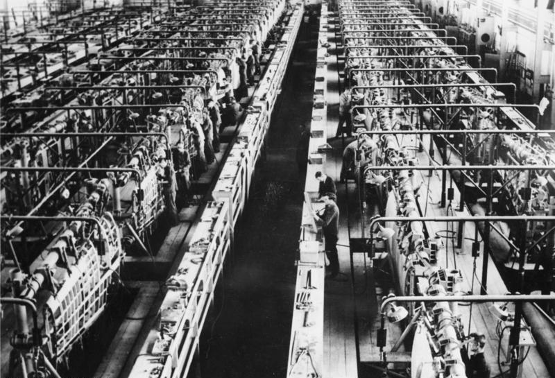 Deutsche Jagdmaschinen werden hergestellt. Hier entstehen im fließenden Rhythmus der Bewegung die Schwingen für den Messerschmitt-Jäger.